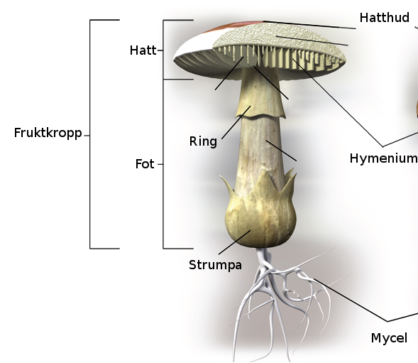 Schema över hattsvamp.